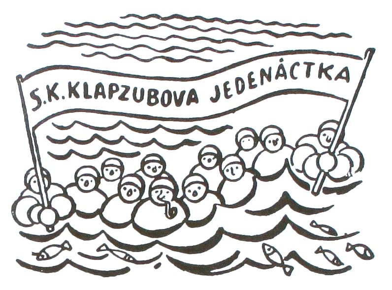 Ilustrace k románu Klapzubova jedenáctka